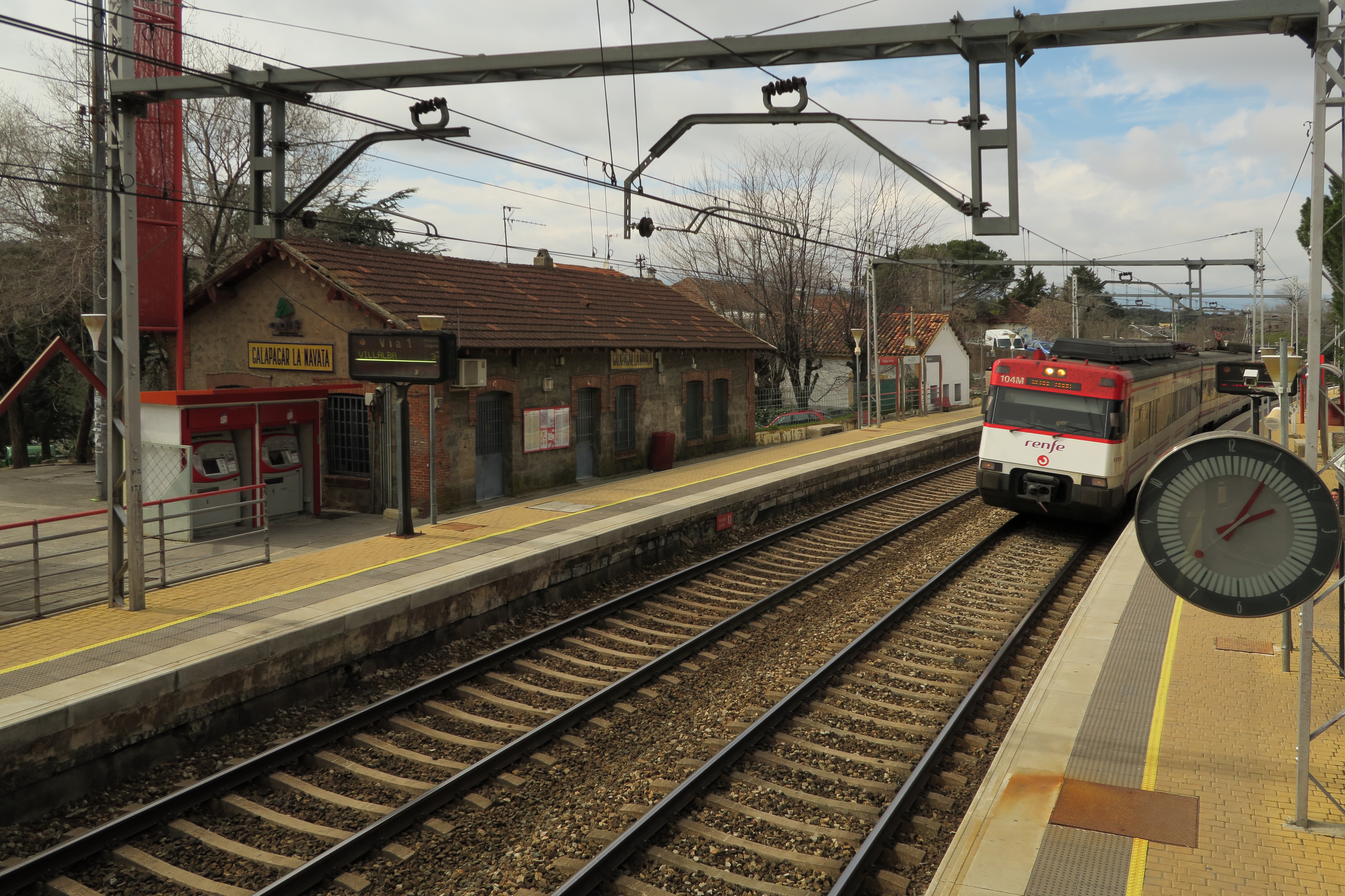 Estación de Galapagar-La Navata